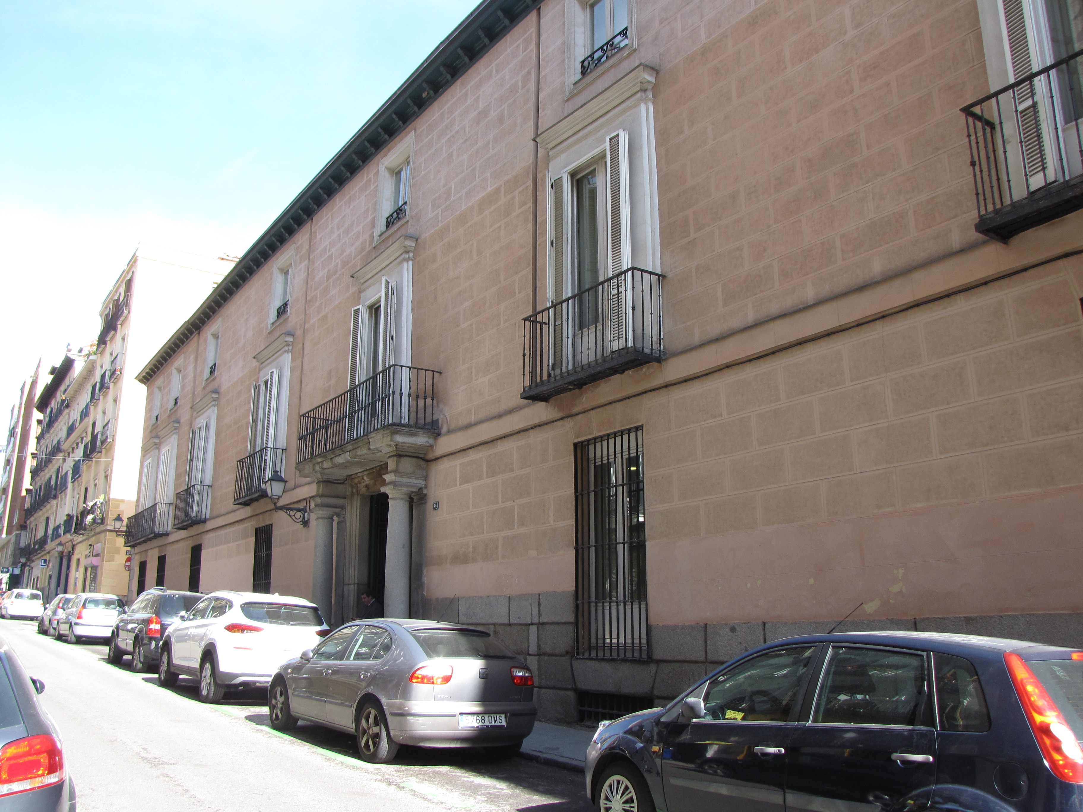 Fotografía de la fachada principal del palacio del Marqués de Santa Cruz.